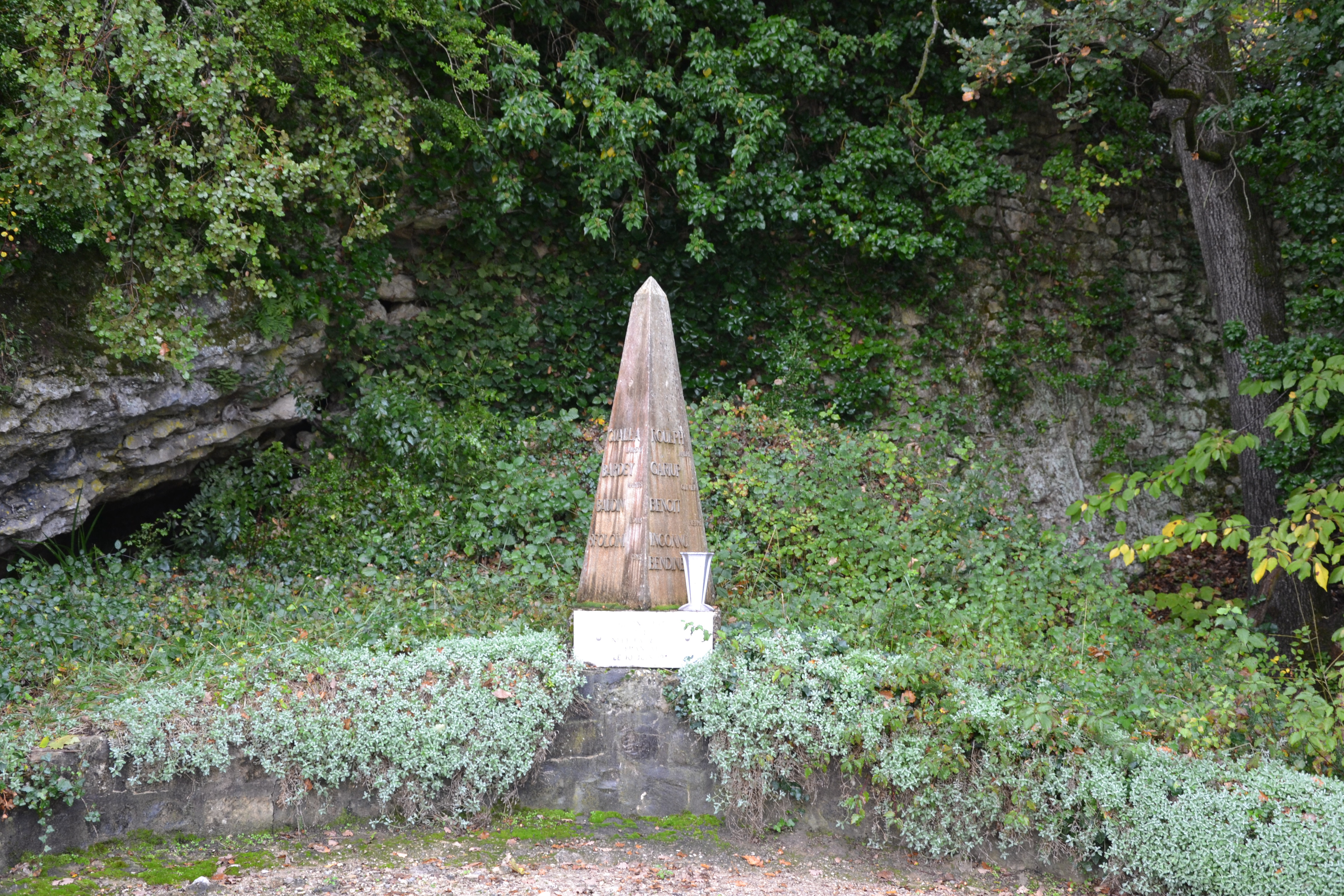 Stèle commémorative du Maquis Vasio (1944)